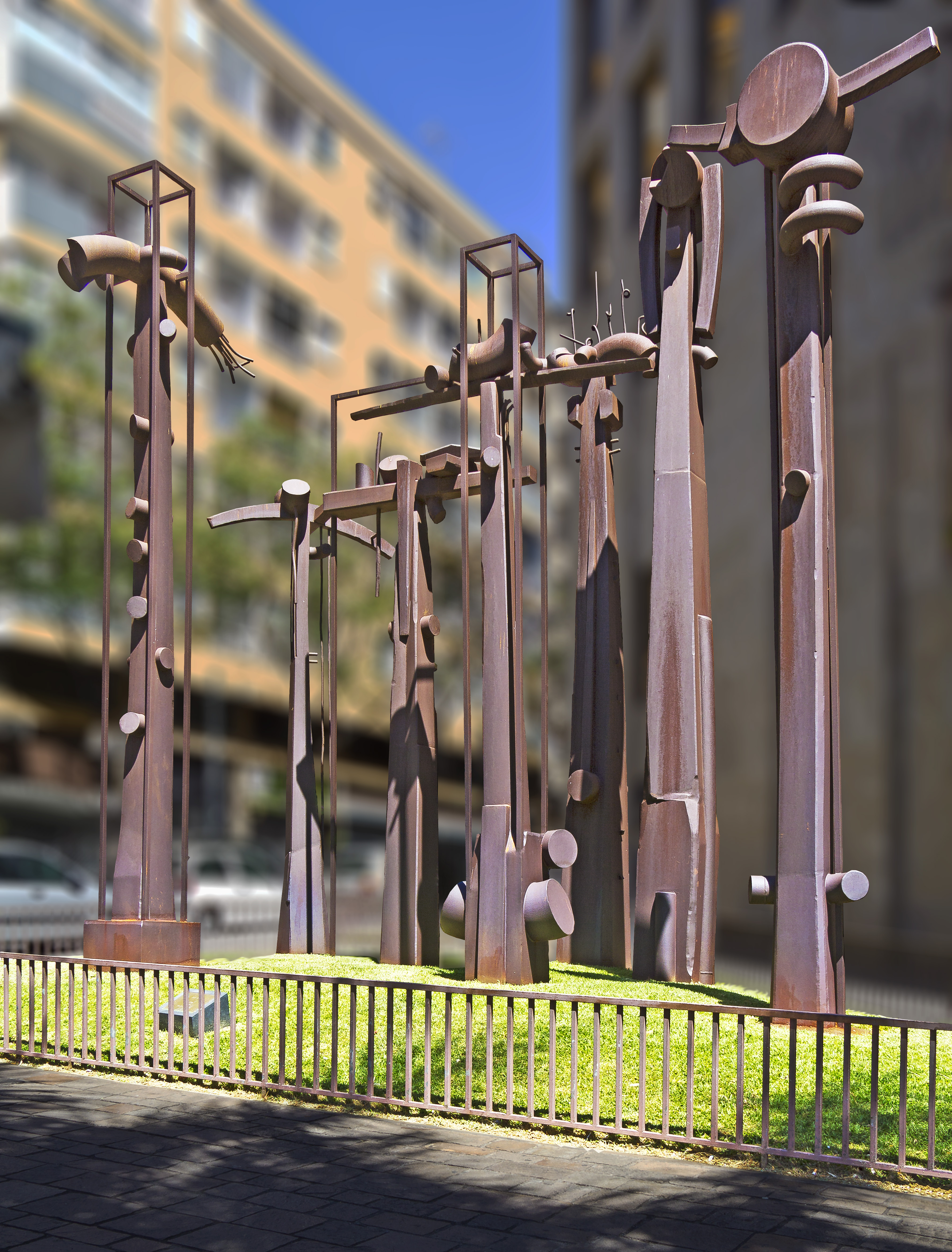 Die Gruppe „Siete Islas“ wurde 1987 von José Abad geschaffen. Sie befindet sich auf der Plaza del Patriotismo in Santa Cruz de Tenerife.